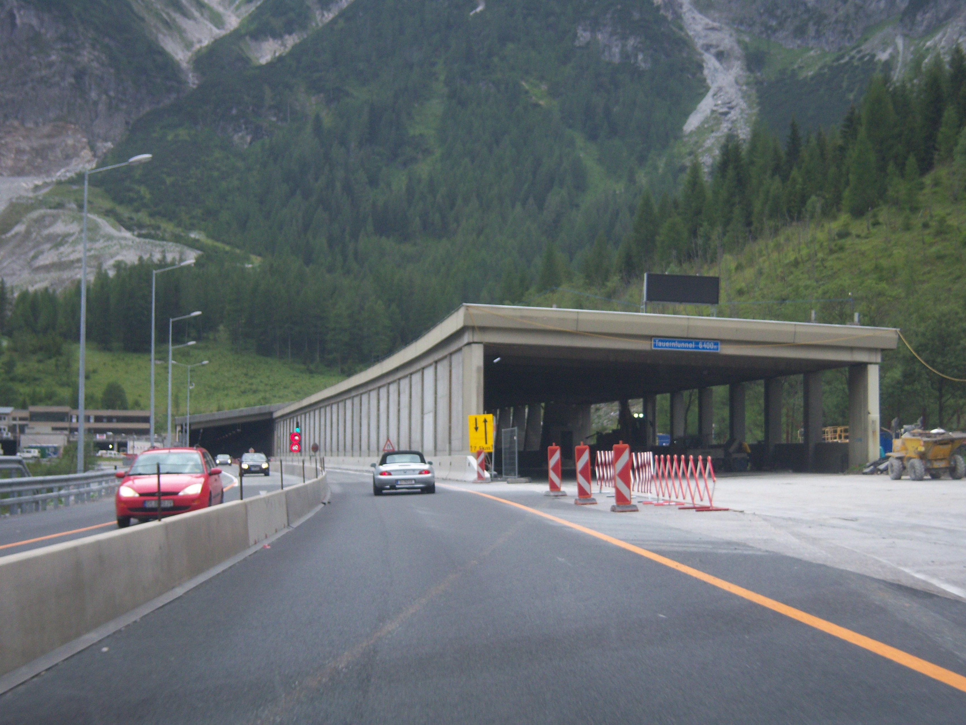 Tauern Autobahn A10 Richtung Villach vor dem Nordportal des Tauerntunnel